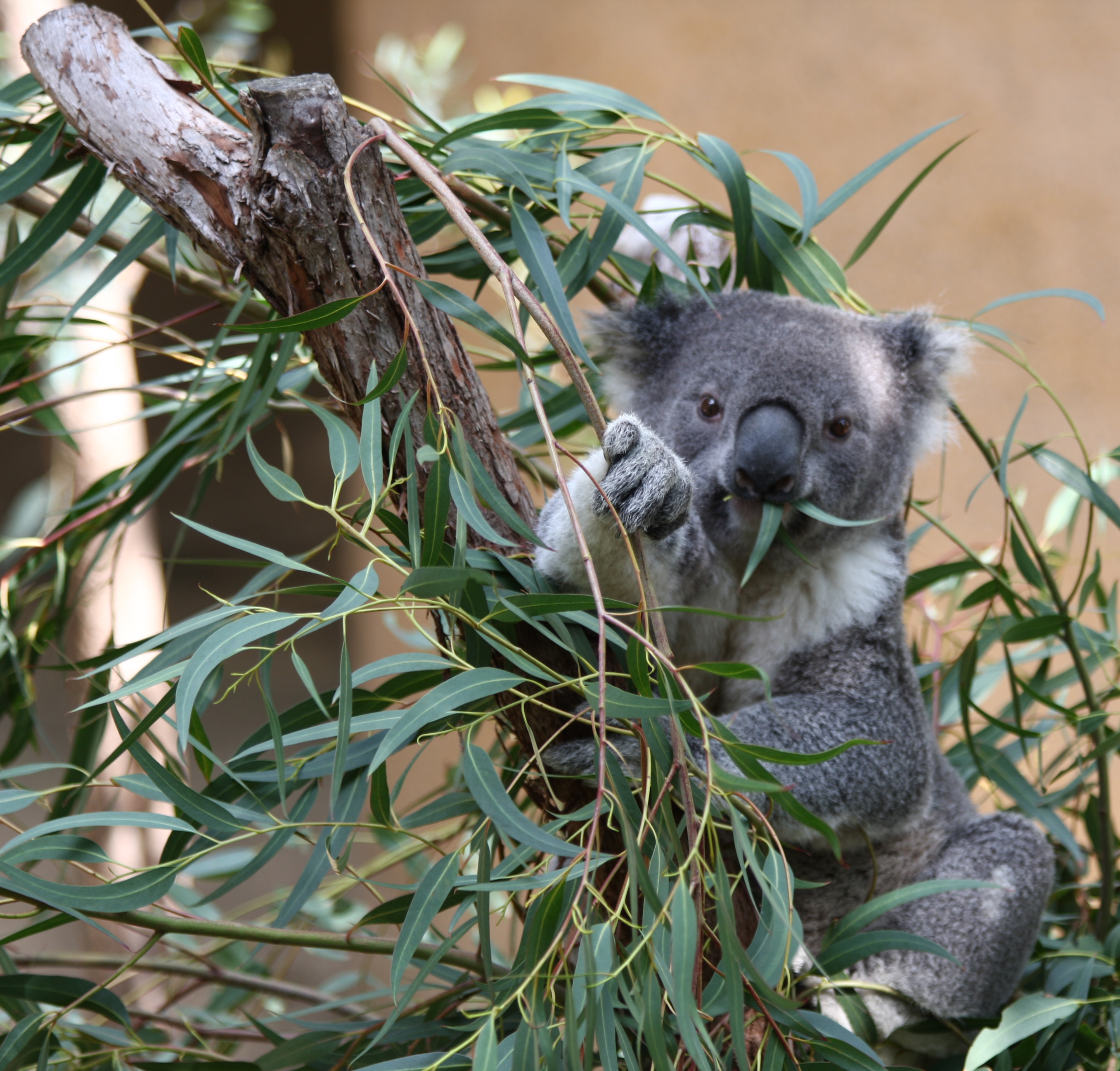 Australian Koala